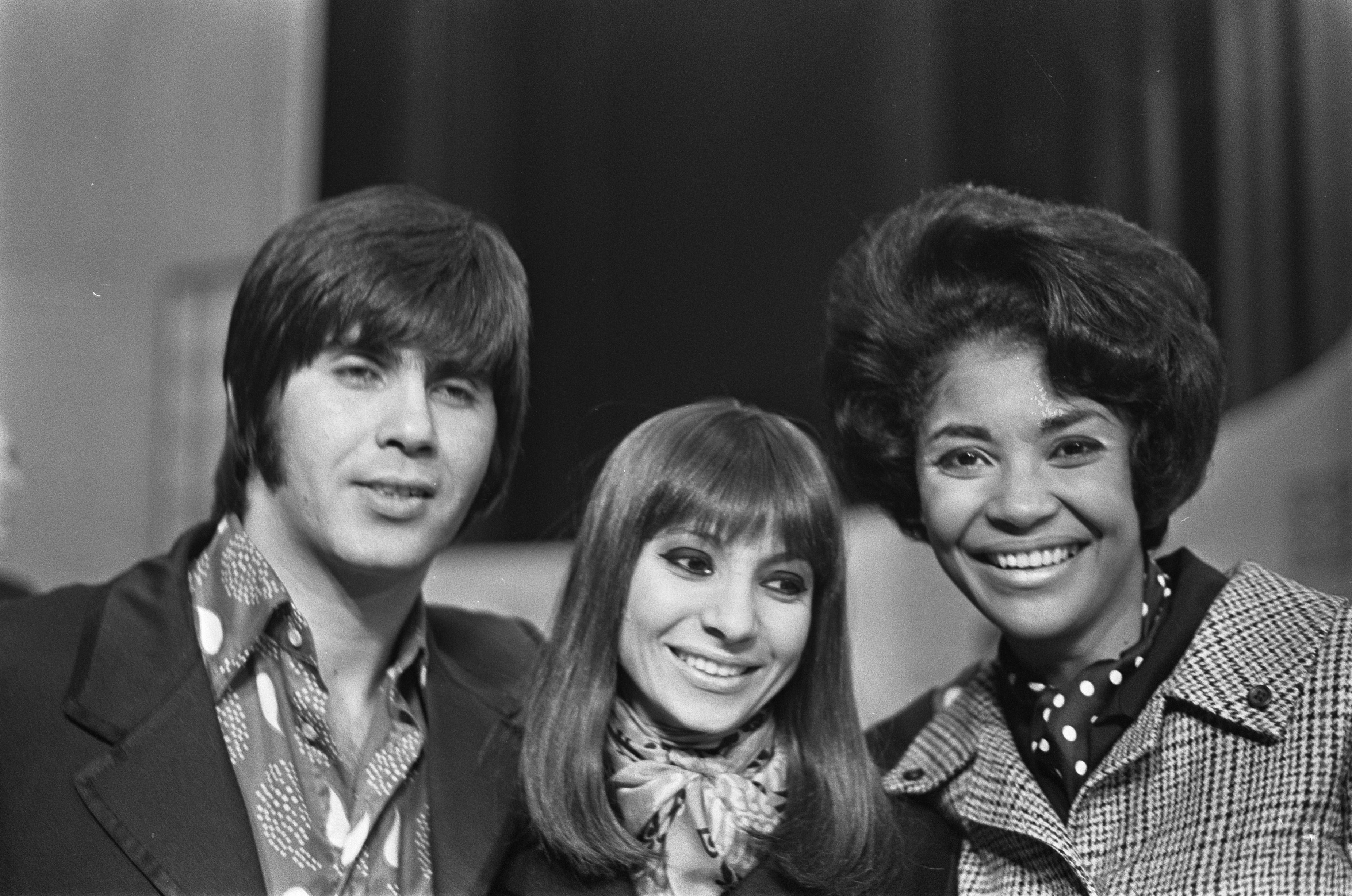 Collectie / Archief : Fotocollectie Anefo Reportage / Serie : Grand Gala du Disque 1968 Beschrijving : Grand Gala du Disque in RAI. Abraham en Ester Ofarim en Nancy Wilson Datum : 6 maart 1968 Locatie : Amsterdam Trefwoorden : portretten, zangers Persoonsnaam : Wilson, Nancy Fotograaf : Nijs, Jac. de / Anefo Auteursrechthebbende : Nationaal Archief Materiaalsoort : Negatief (zwart/wit) Nummer archiefinventaris : bekijk toegang 2.24.01.05 Bestanddeelnummer : 921-1408 Reacties Geplaatst door Maaike op 02 oktober 2013 - 04:40. Esther Ofarim Geplaatst door Maaike op 07 maart 2014 - 21:55. locatie: RAI-congrescentrum Plaats: Amsterdam, Noord-Holland